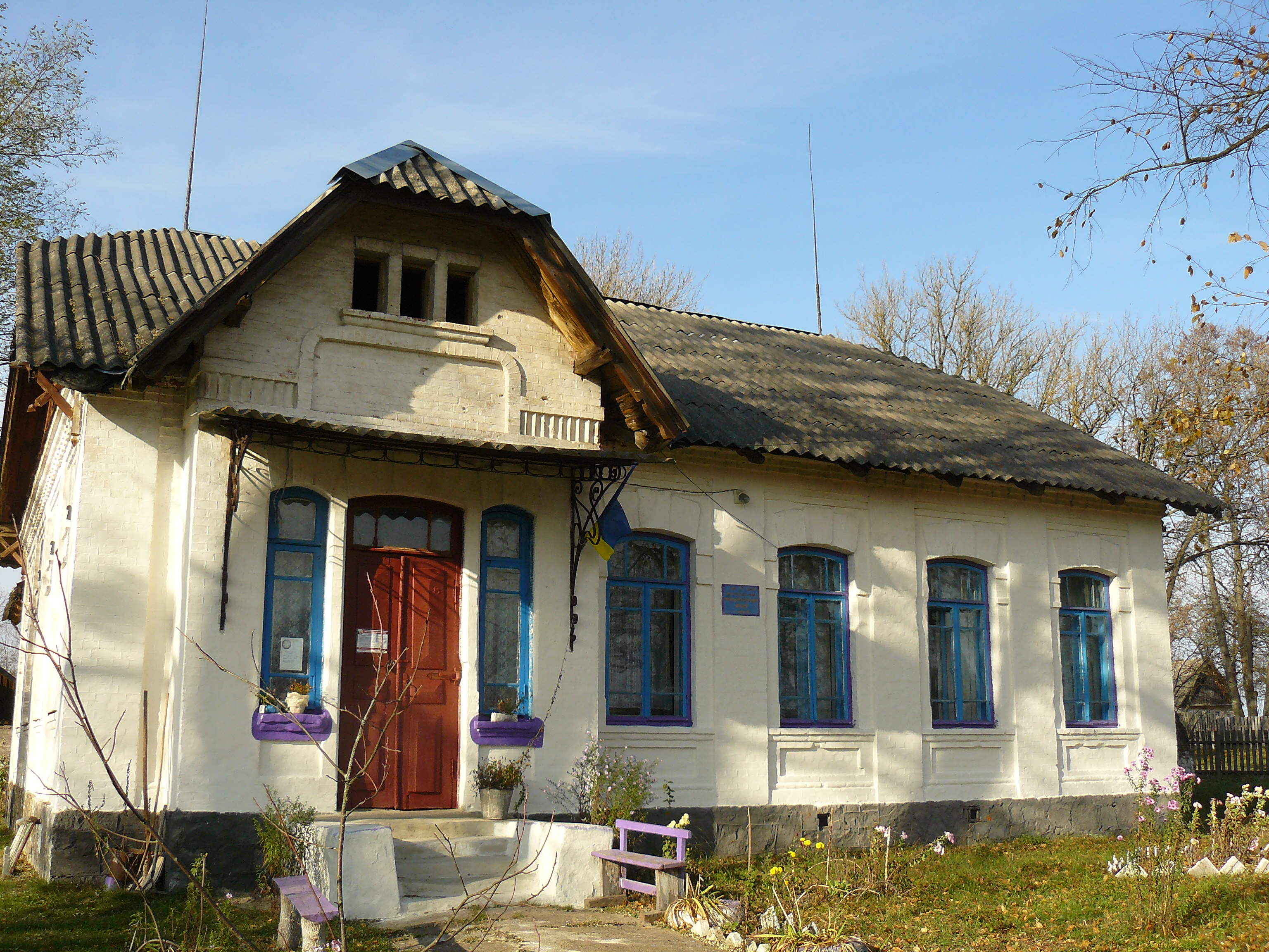 ФАП в Ушиці